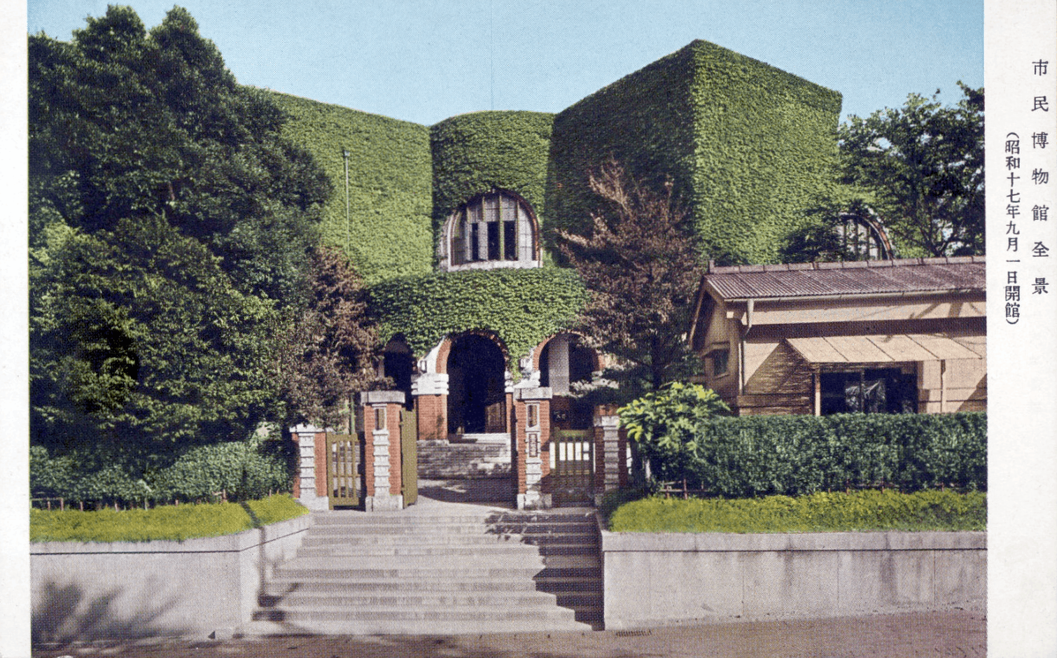 「横浜市 市民博物館 記念エハガキ」6枚入のうちの1枚。 旧 横浜市震災記念館。